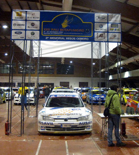 Victor Senra Peugeot 306 Rally Botafumeiro 2010